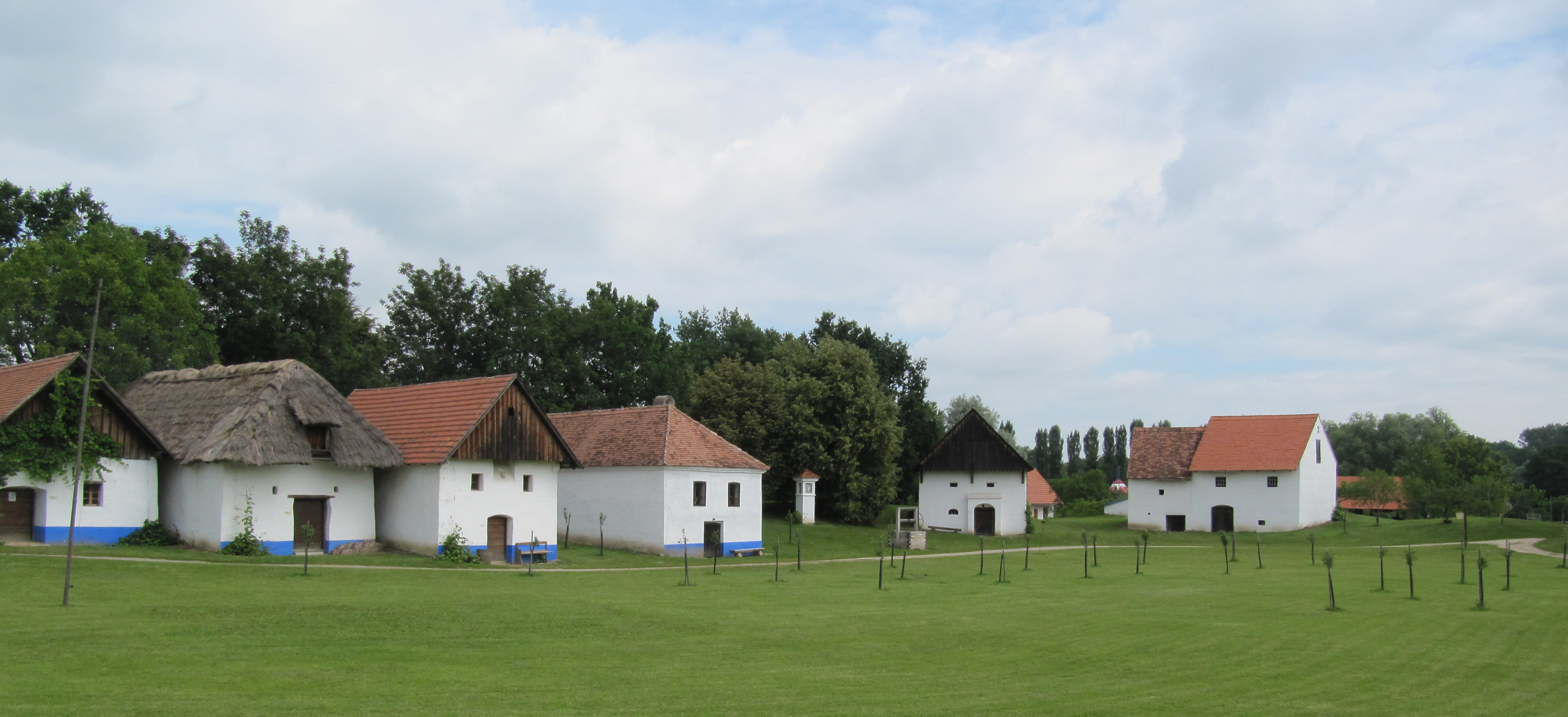 Strážnice, skanzen, areál vinohradnických staveb